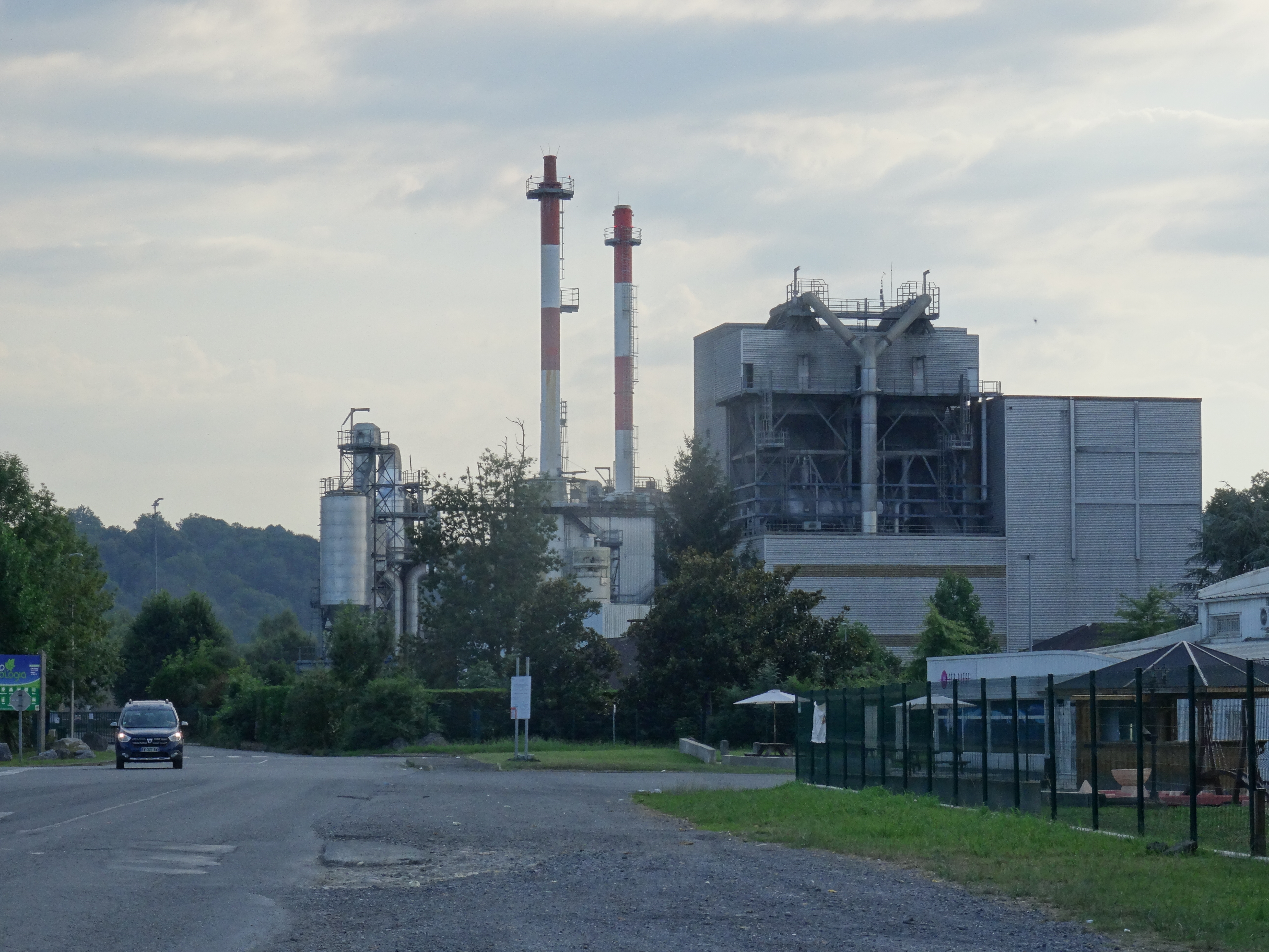 Incinérateur de Lescar.